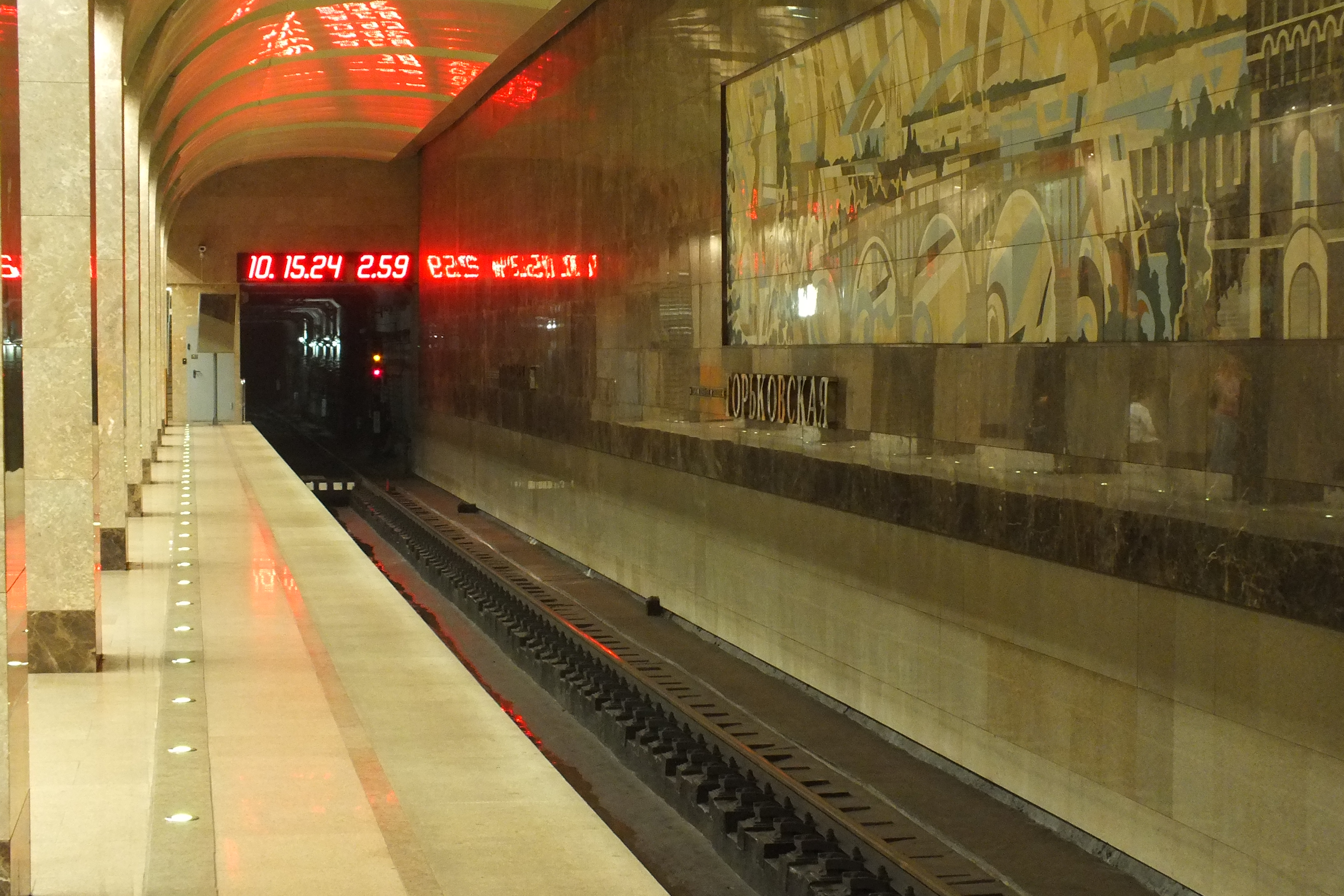 Интервальные часы на станции метро «Горьковская» (Нижний Новгород), сентябрь 2015 года. Частично видно также оформление путевой стены, а также железнодорожный путь.